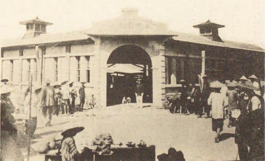 埔里市場舊照